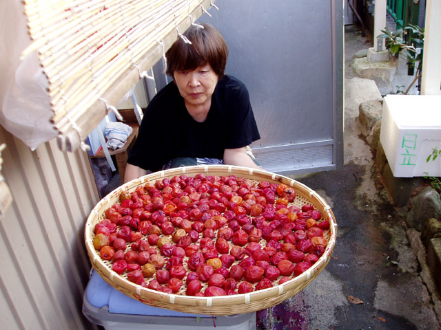 Umeboshi on a zaru